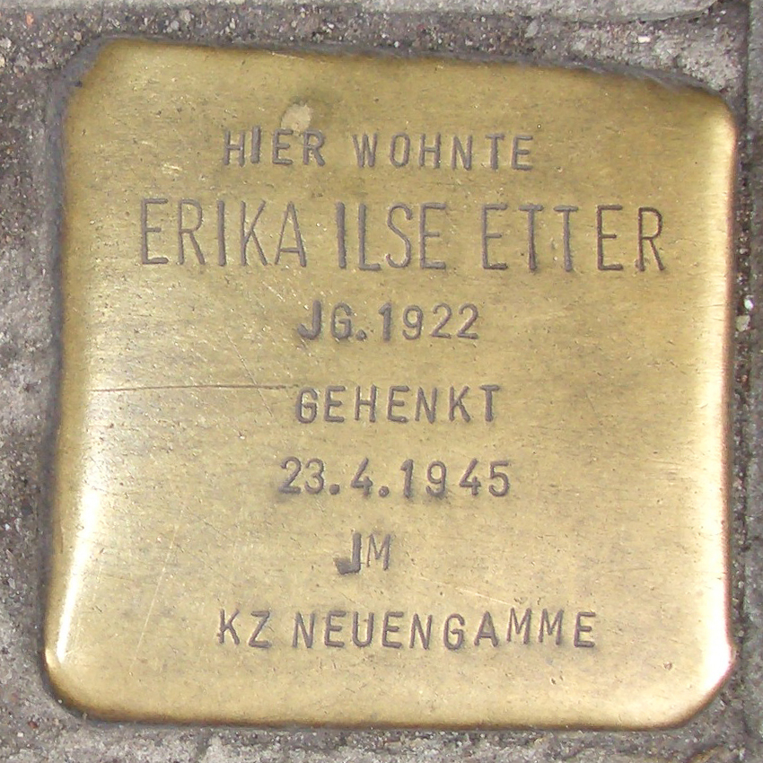 Stolperstein für Erika Ilse Etter vor dem Gebäude Alsterdorfer Straße 40 in Hamburg-Winterhude.